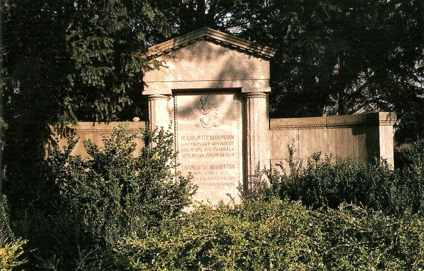 Lübecker Burgtorfriedhof; Grabmal Karl Peter Klügmann